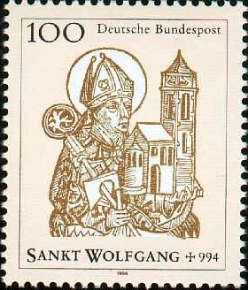 St. Wolfgang (timbre RFA / Briefmarke BRD)